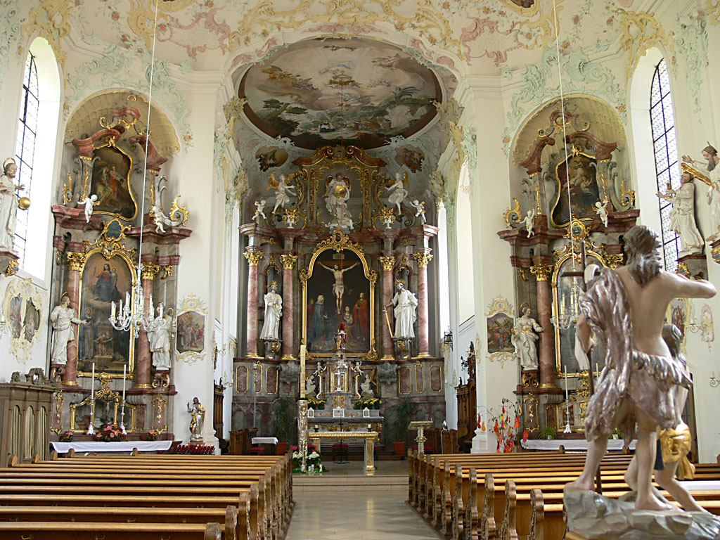 Krumbach (Schwaben) - Innenansicht St. Michael